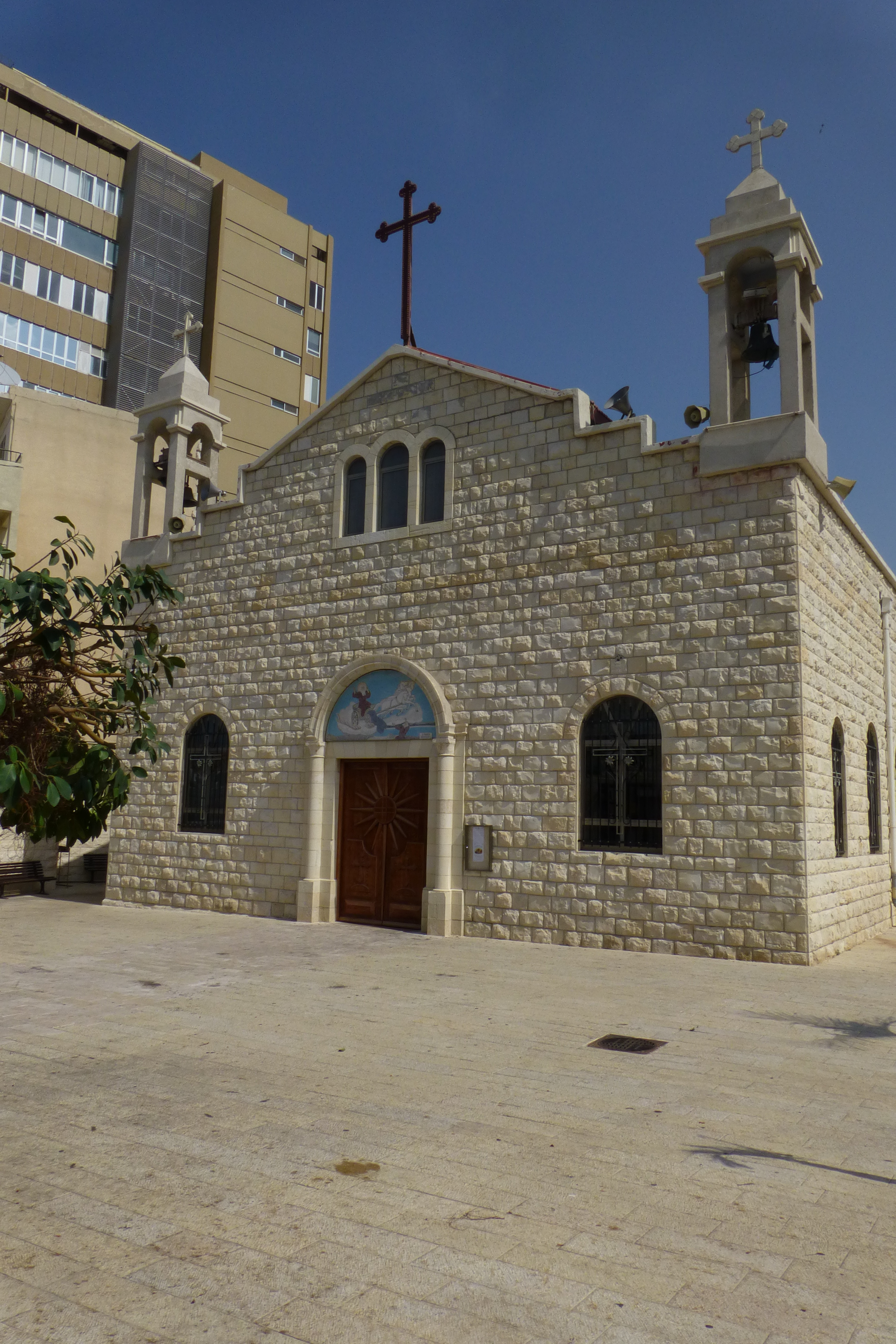 קתדרלת אליהו הנביא, המוכרת גם בשם קתדרלת מר אליאס, היא כנסייה יוונית-קתולית מלכיתית המוקדשת לאליהו הנביא, ואשר שוכנת ברחוב עין דור 23 בעיר התחתית שבחיפה. הקתדרלה משמשת כמקום מושבו של הארכיבישוף היווני-קתולי בעיר, העומד בראש הקהילה המלכיתית שהינה הקהילה הנוצרית הגדולה בחיפה.